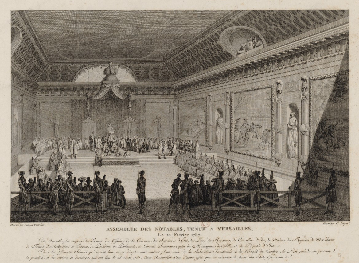 Französische Notabelenversammlung von 1787 (Originalbildbeschreibung: "Assemblée des notables tenue a Versailles le 22 février 1787 : cette Assemblée fut composée des princes, des officiers de la Couronne,..."